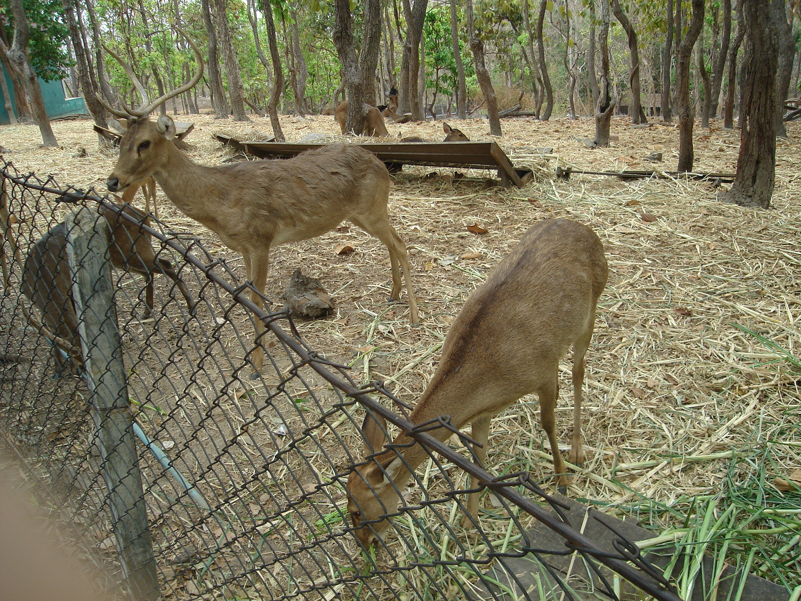 Deer(s) in Chiang Mai zoo